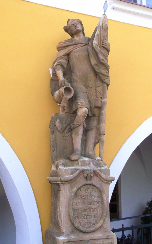 Socha sv. Floriána (Žacléř)